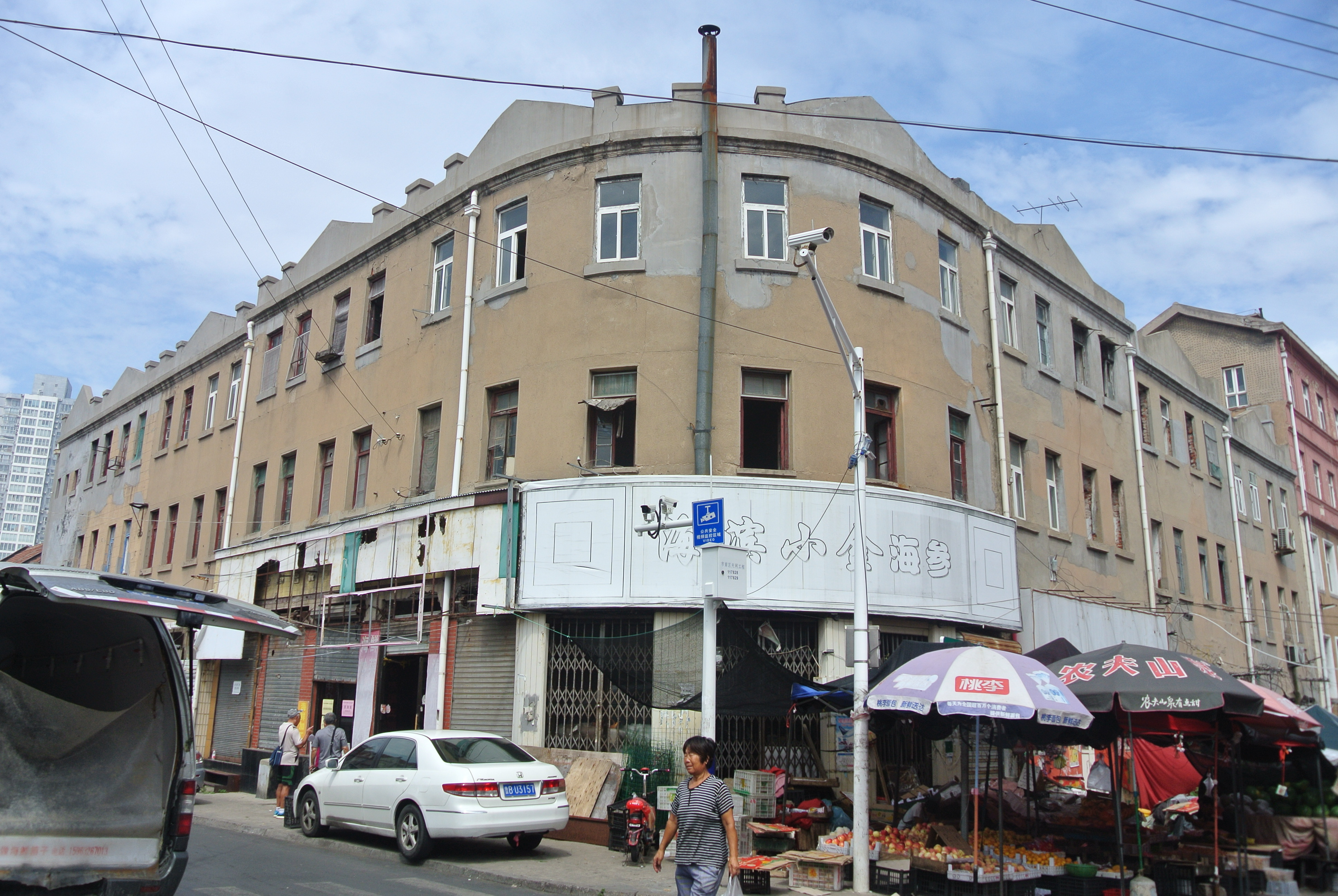 青岛四方路九如里，东南角